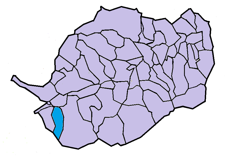 Planès en el Conflent, a partir del mapa municipal del Conflent de lliure disposició adaptat al Nomenclàtor toponímic aprovat el 2007